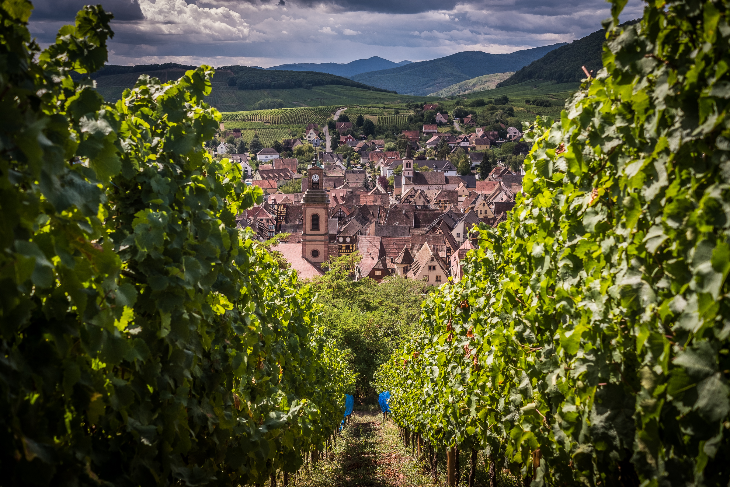 Hugel et Fils vignoble du grand cru Schœnenbourg Riquewihr août 2020